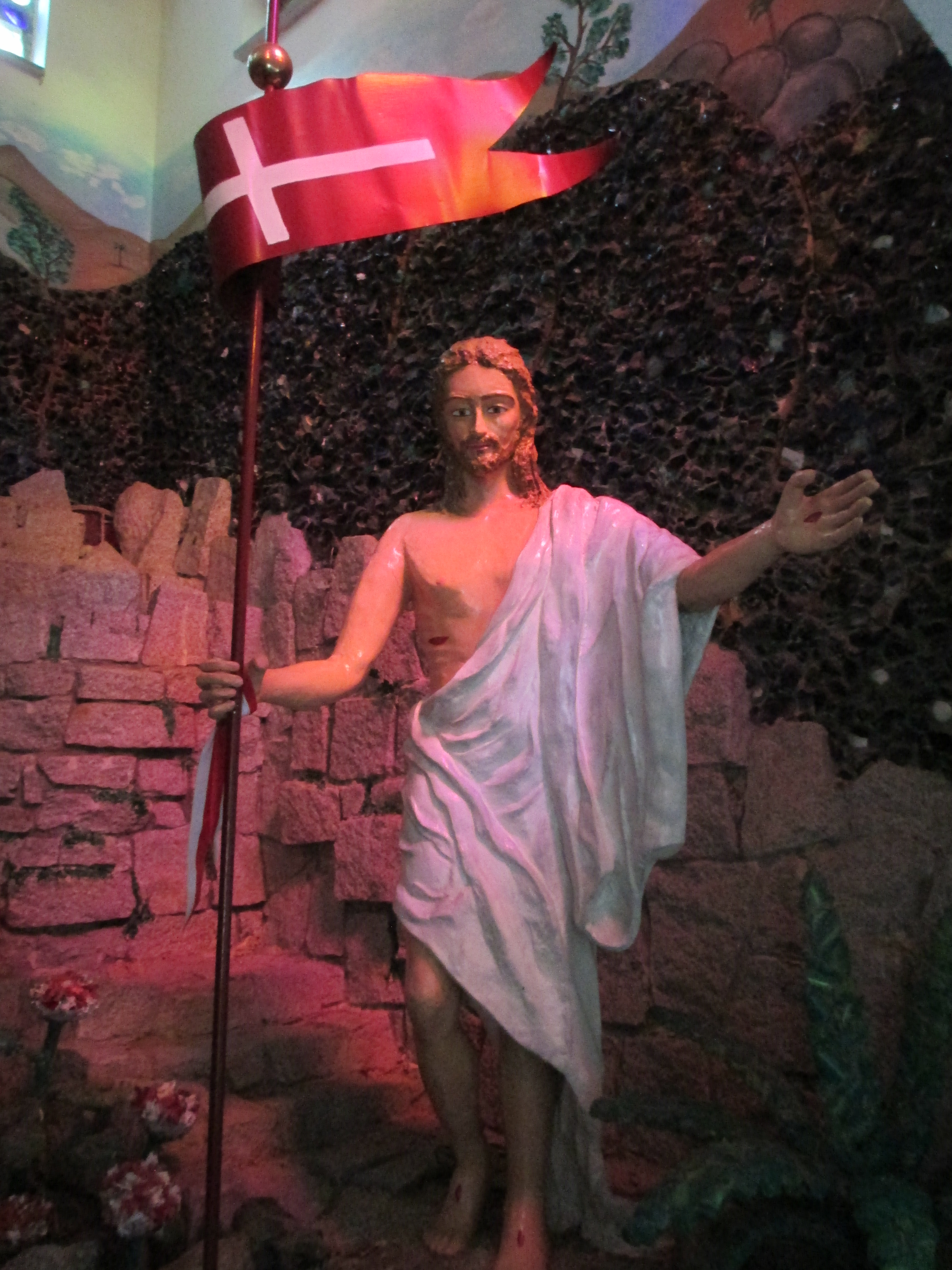 Zmartwychwstanie Jezusa Chrystusa w Sanktuarium Cudownego Obrazu Matki Boskiej Licheńskiej